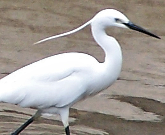 Little Egret Egretta garzetta, summer